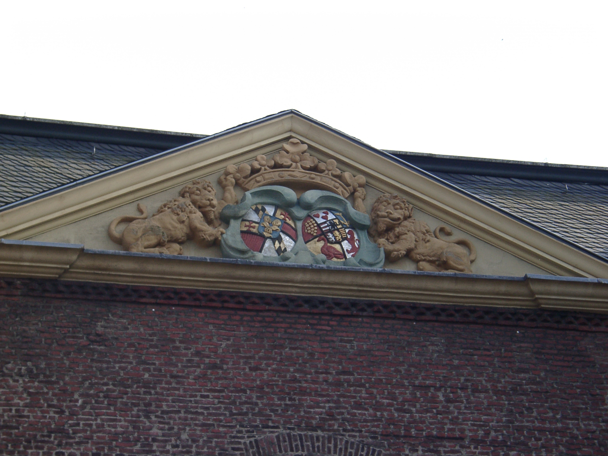 Wappen am Giebel von Schloss Neersen - selbst fotografiert (16.5.2005)